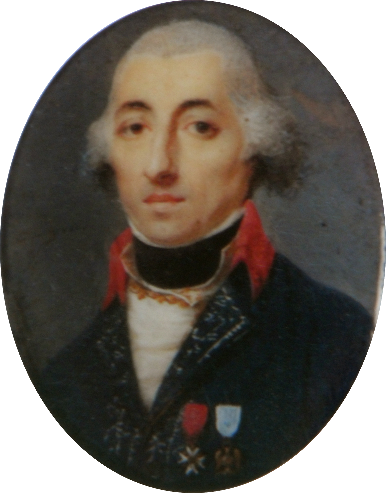 Portrait par Charles Guillaume Alexandre Bourgeois